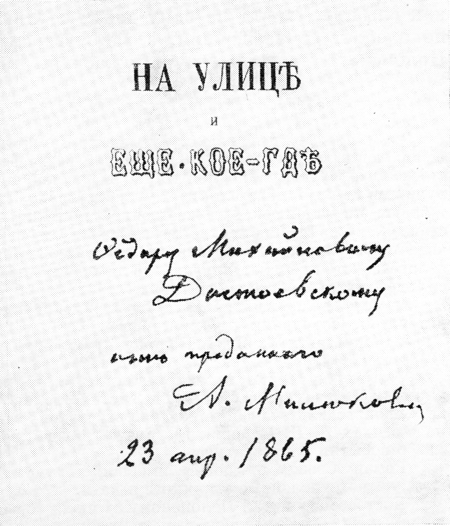 Дарственная надпись А. П. Милюкова Ф. М. Достоевскому на книге "На улице и ещё кое-где", 1865 год